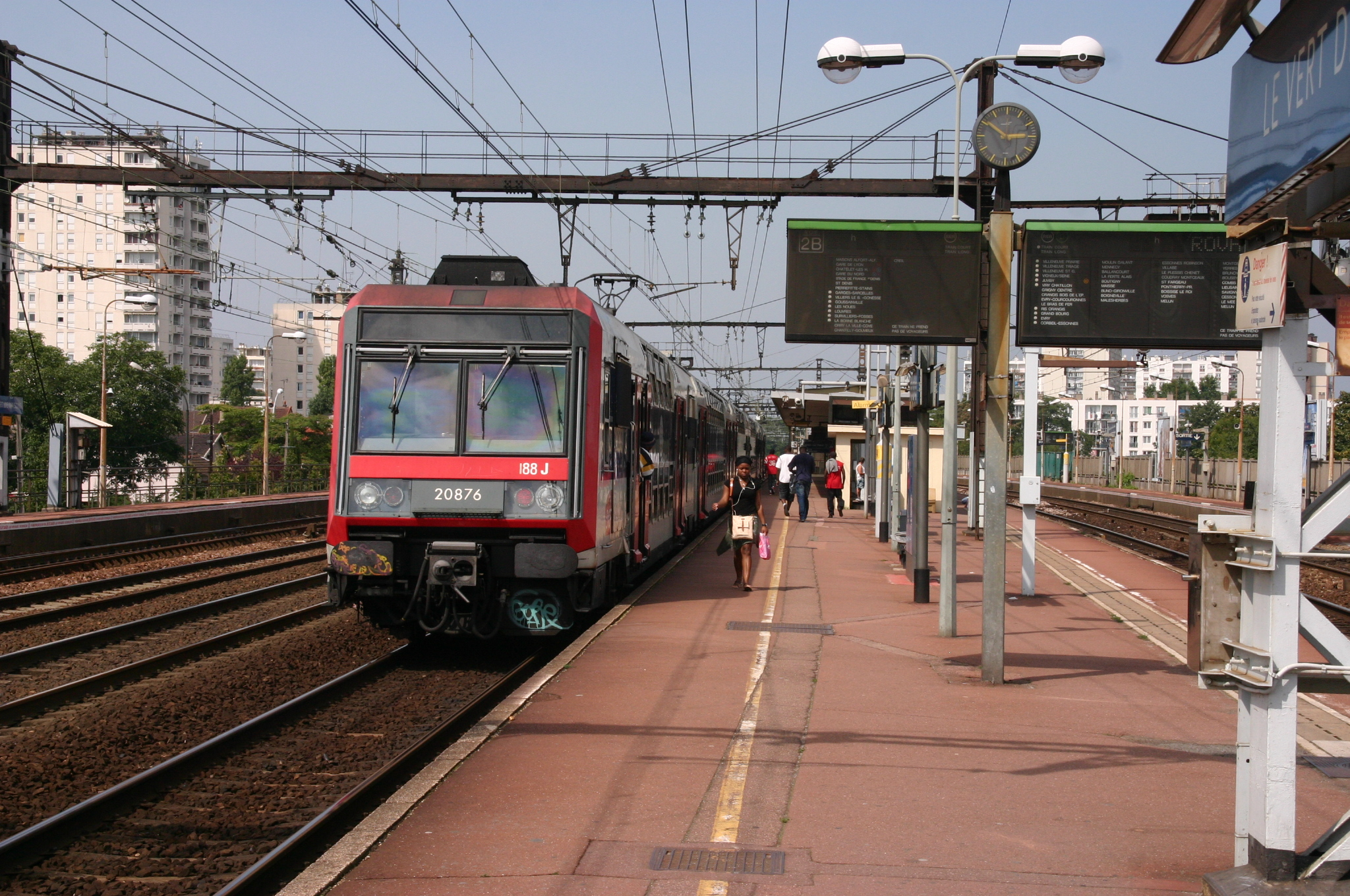 La Gare du Vert-de-Maisons, Maisons-Alfort / Alfortville, département du Val-de-Marne, France